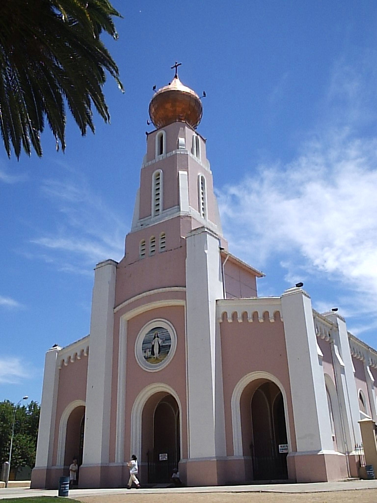 Santuario de Santa Rosa de Pelequén Autor:Alstradiaan Alstradiaan Blog Fecha:Enero de 2005 Fotografía tomada con una cámara digital Olympus camedia D-395 de 3.2 megapixeles